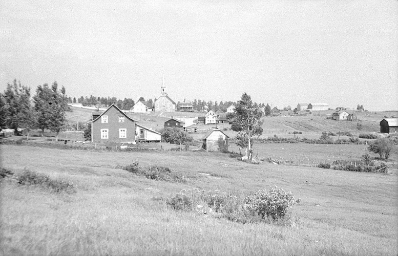 Village de Saint-Fidèle, comté de Charlevoix